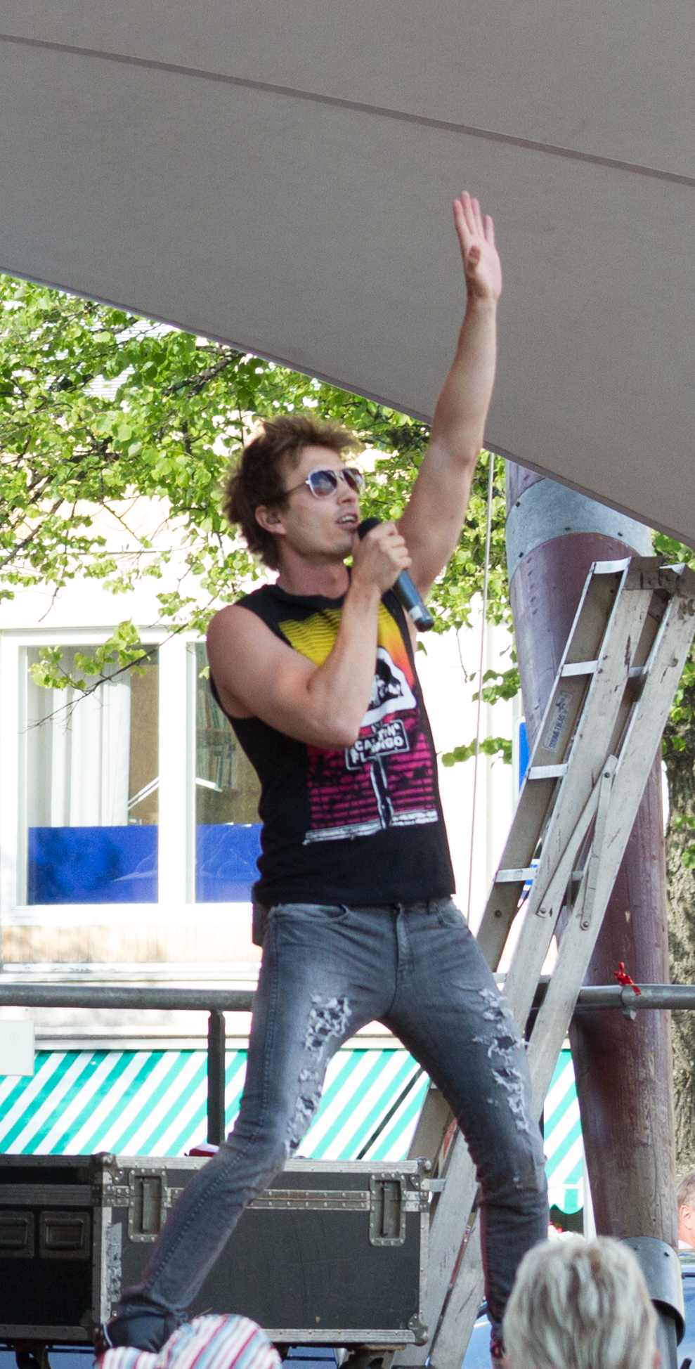 Giant Leap yhtyeen laulusolisti Sebastian Rejman